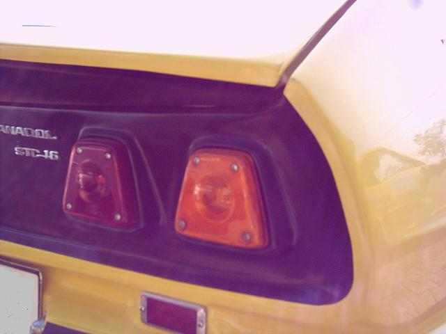 Türkiye'de seri olarak üretilen ilk otomobil markası Anadol'dan bir görünüm.